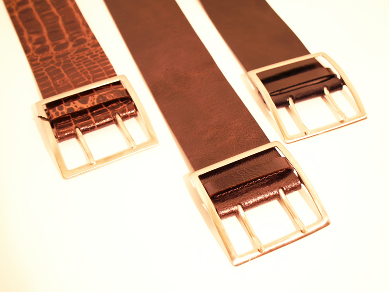 Ceinturen, Ceintuurs